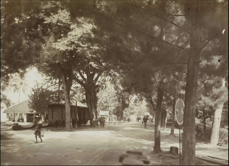 Straat te Pare bij Kediri, circa 1910Bahasa Indonesia: Pemandangan Jalan Pare, Kediri. Tepatnya di wilayah Pulorejo. Tampak sebuah kereta milik Kediri Stoomtram Maatschappij melaju melewati Halte Pulorejo dan mengarah menuju Stasiun Jombang. Tampak pula percabangan jalur kereta api yang menuju Stasiun Ngoro dan Stasiun Kandangan (Kediri).